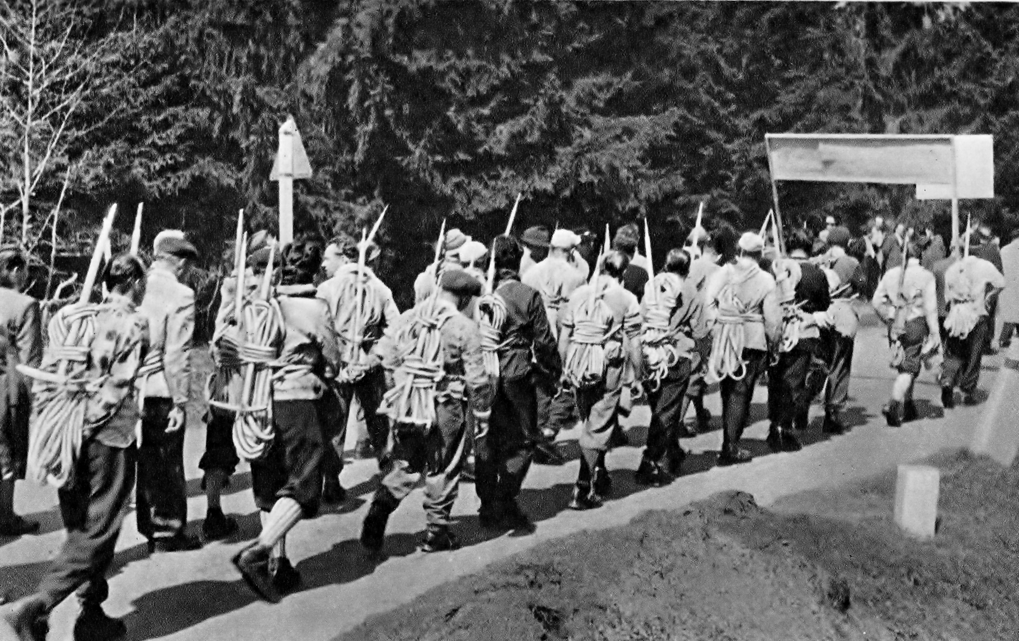 prvomájový sprievod v Starom Smokovci. Na snímke sú členovia Tatranskej horskej služby- 50- roky 20. storočia